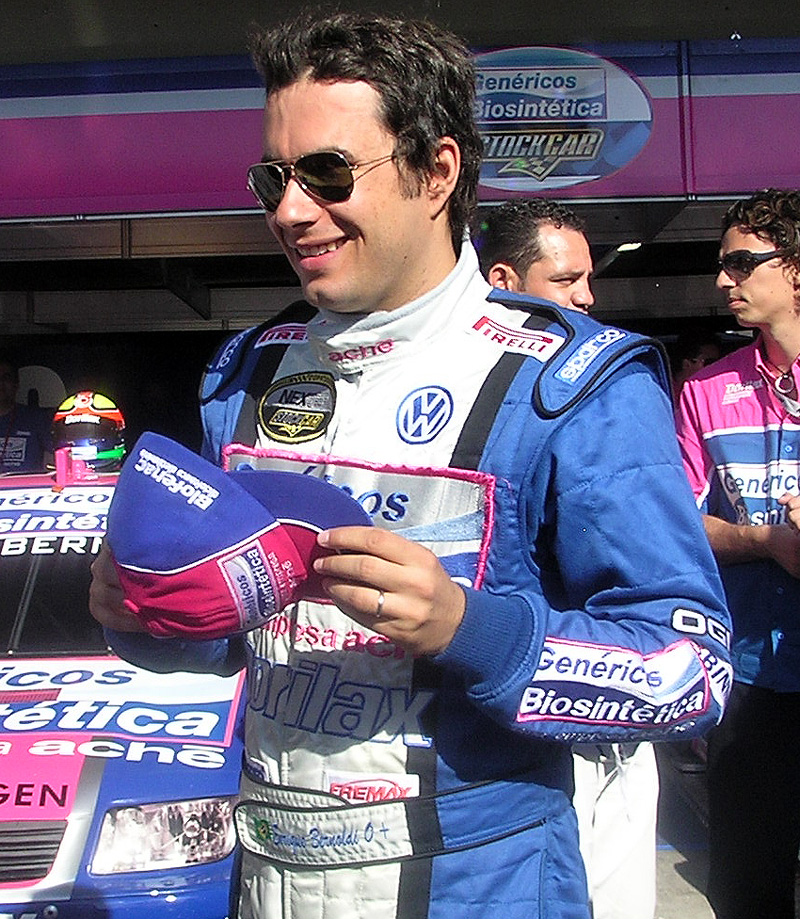 Enrique Bernoldi (Genéricos Biosintética) at Stock Car Brasil in 2007.